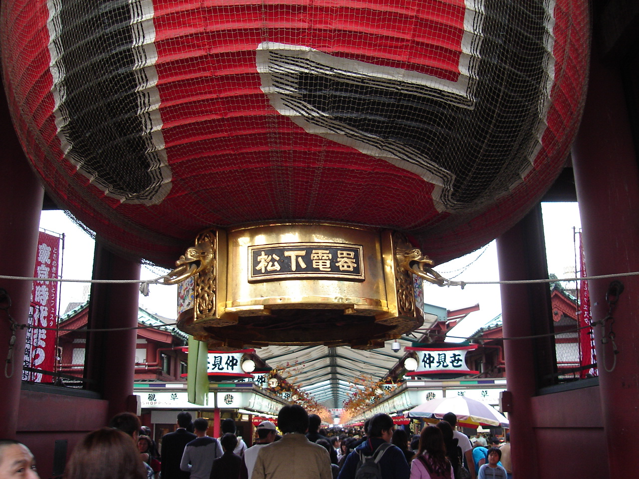 雷門大提灯と仲見世（東京・台東区浅草）